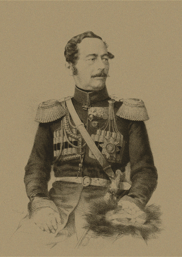 Граф Николай Николаевич Муравьёв-Амурский